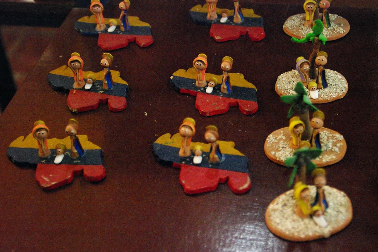 Souvenirs aus Keramik, La Asuncion